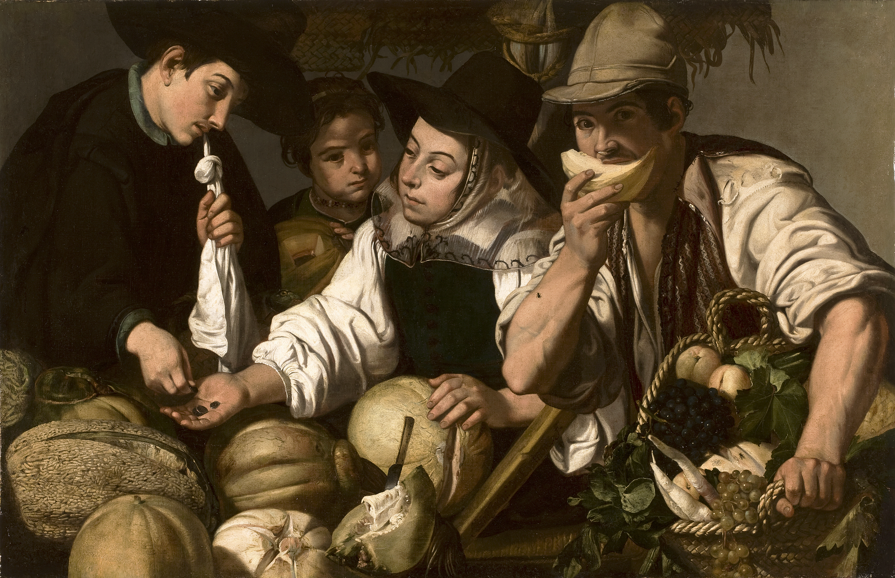 Vendors of Fruitlabel QS:Len,"Vendors of Fruit"label QS:Les,"Vendedores de frutas"